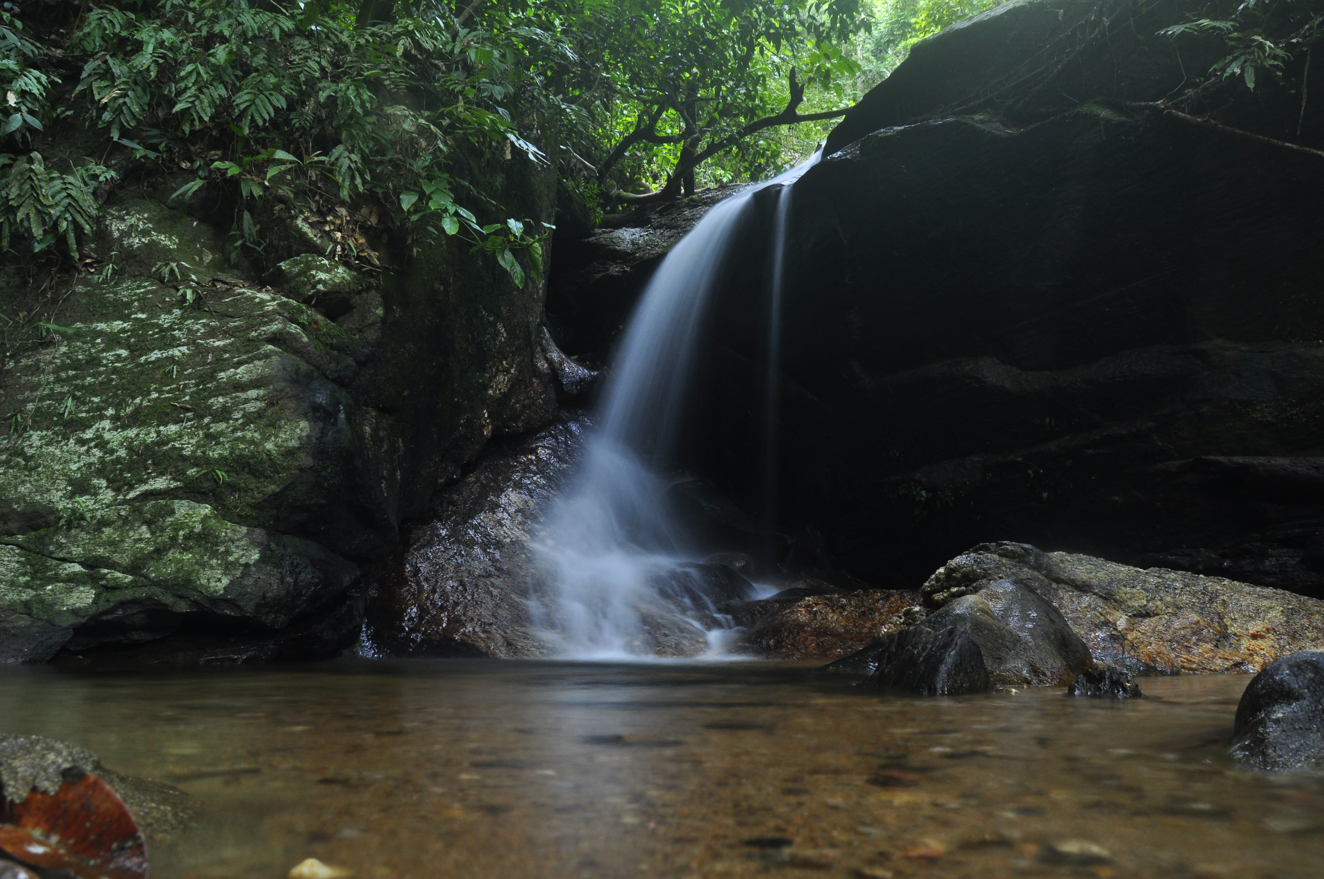 Esta pequena queda se encontra numa trilha um pouco mais acima da cachoeira do Horto, subindo a estrada em direção a Vista Chinesa.